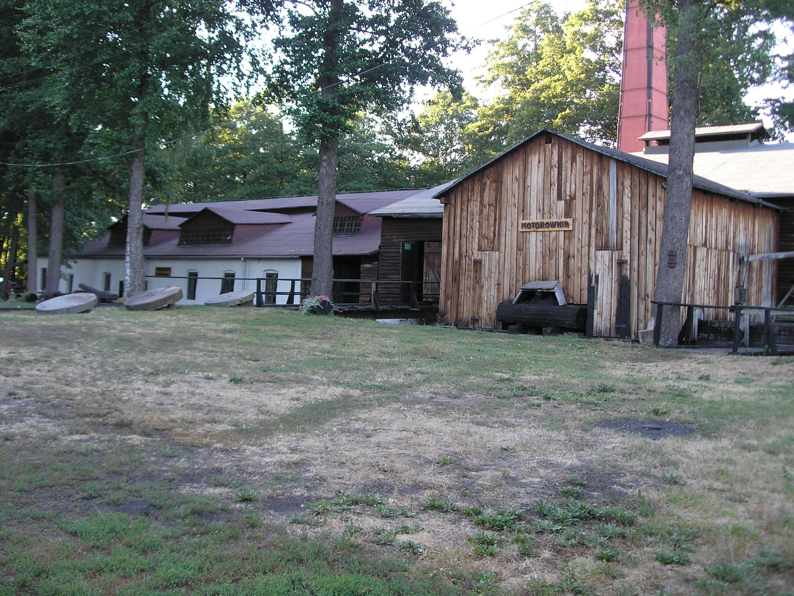 Maleniec. Widok zabytkowego zakładu